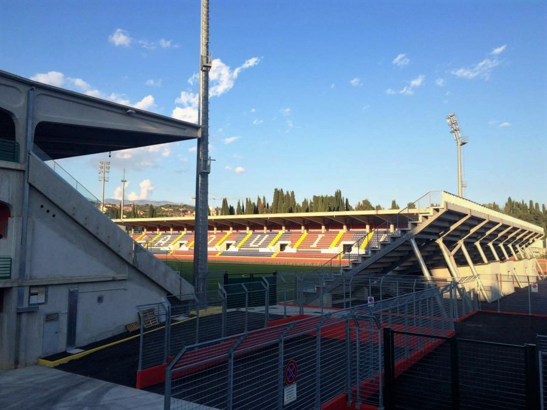 Esterno dello stadio Gran Sasso d'Italia con visuale della Tribuna Est.